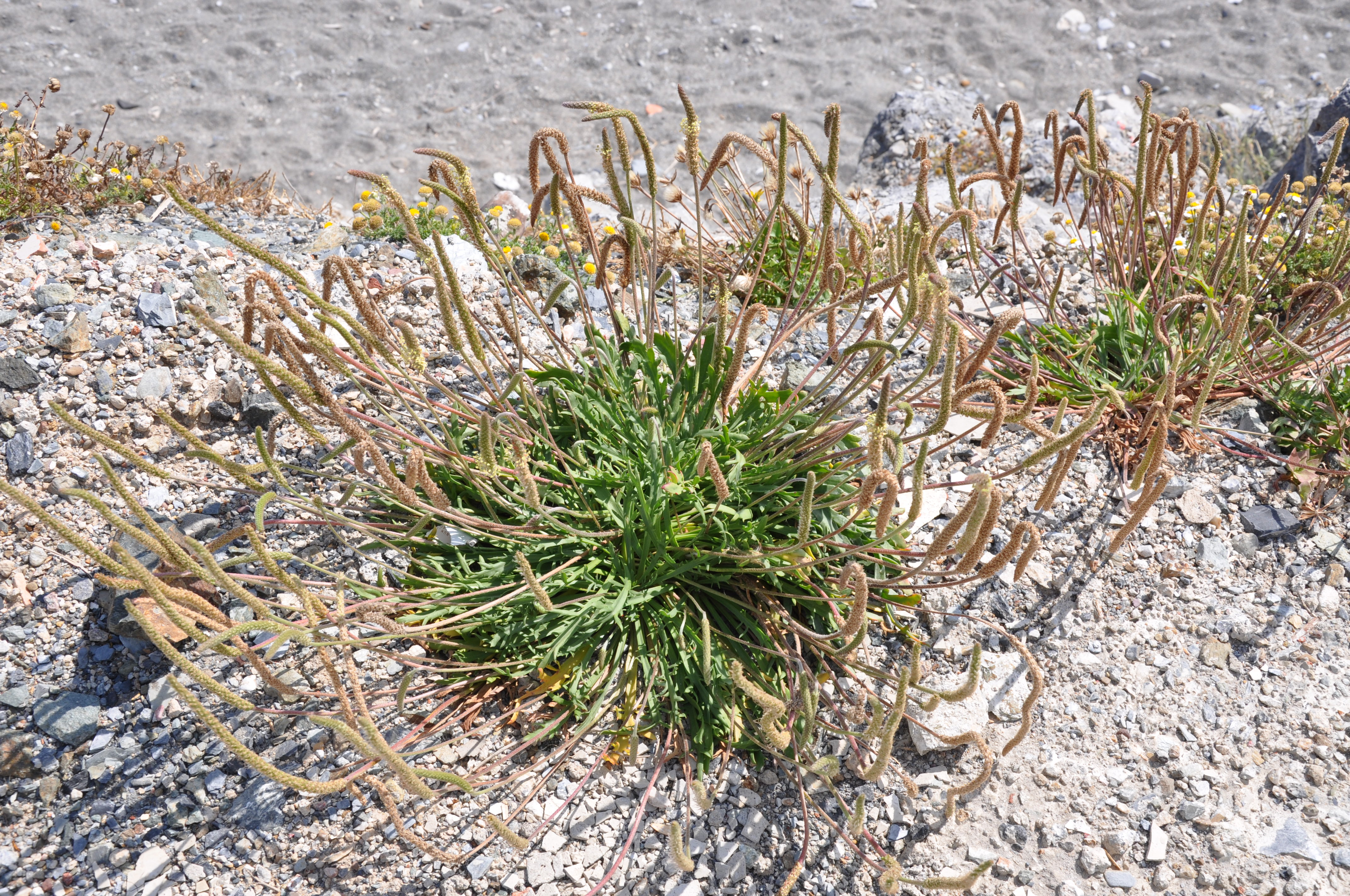 (Plantago macrorrhiza) en Ceuta, España.